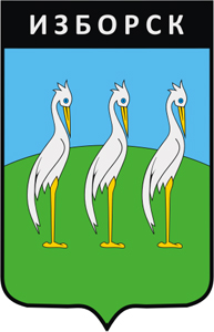 Герб Изборска